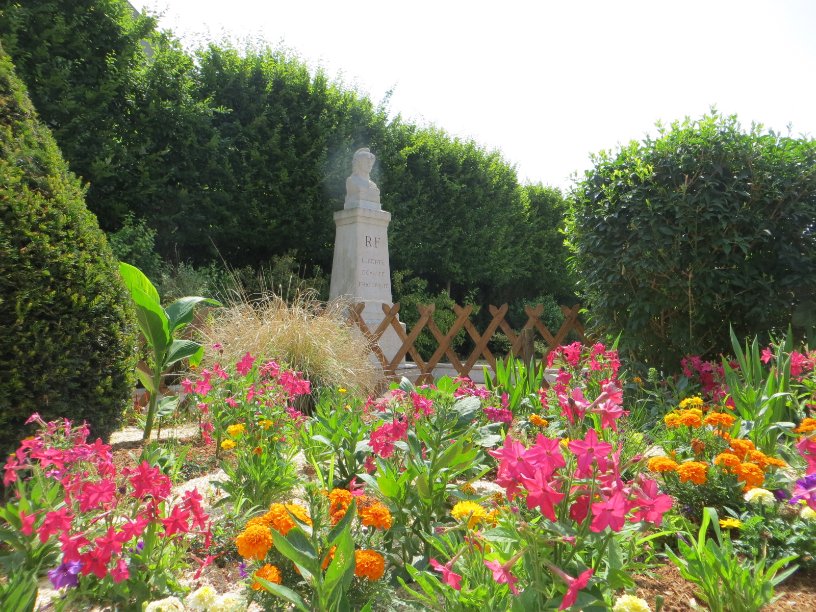 Vue générale Place de la République Deuil-La Barre